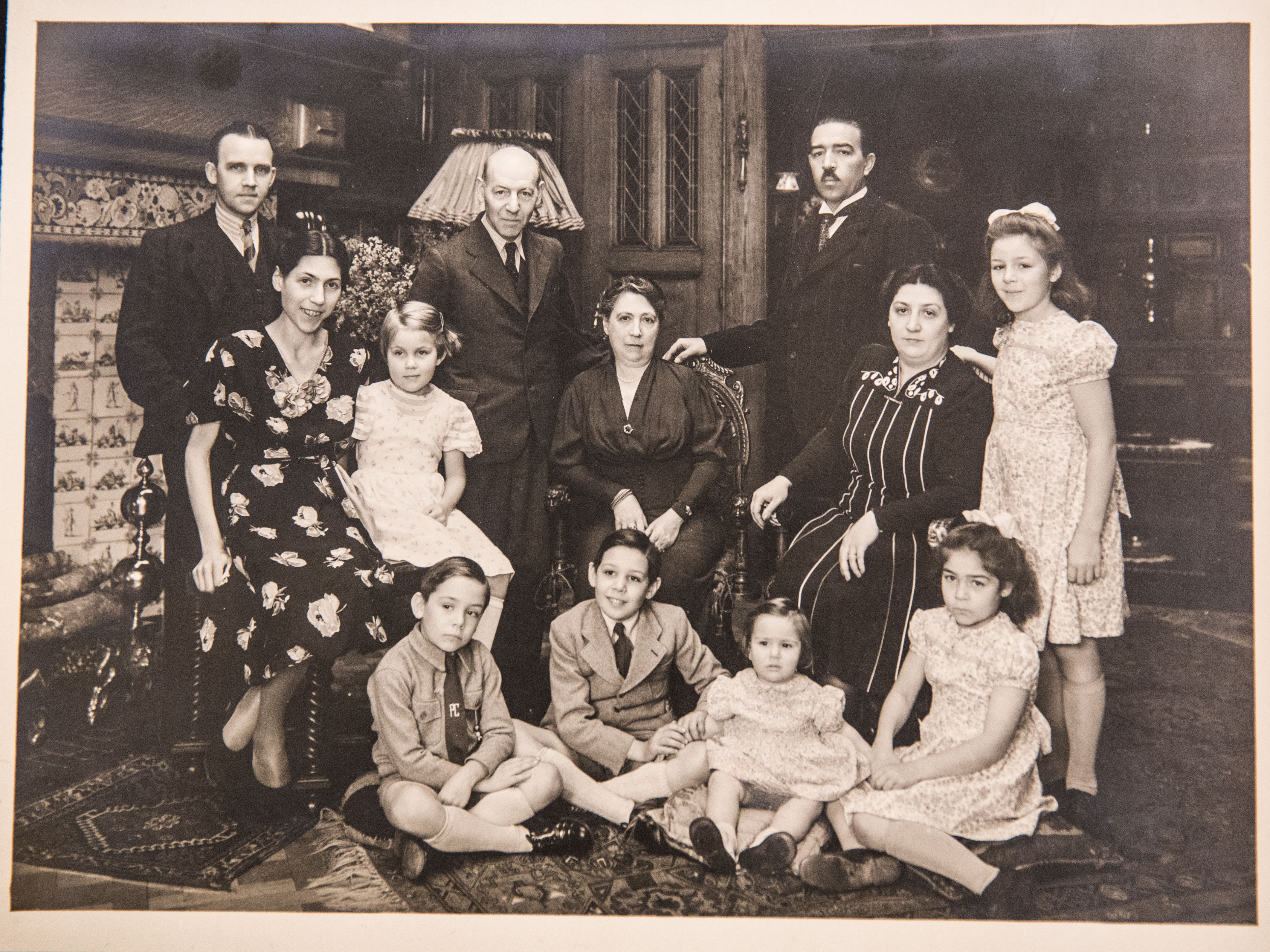 Familieportret van de familie Huybrechts. Uiterst links: Olympisch zeilkampioen Léon Huybrechts (goud: Parijs 1924), zilver: Londen 1908, Antwerpen 1920). Tweede van rechts: Louis Huybrechts (Olympisch zilver, Londen 1908).